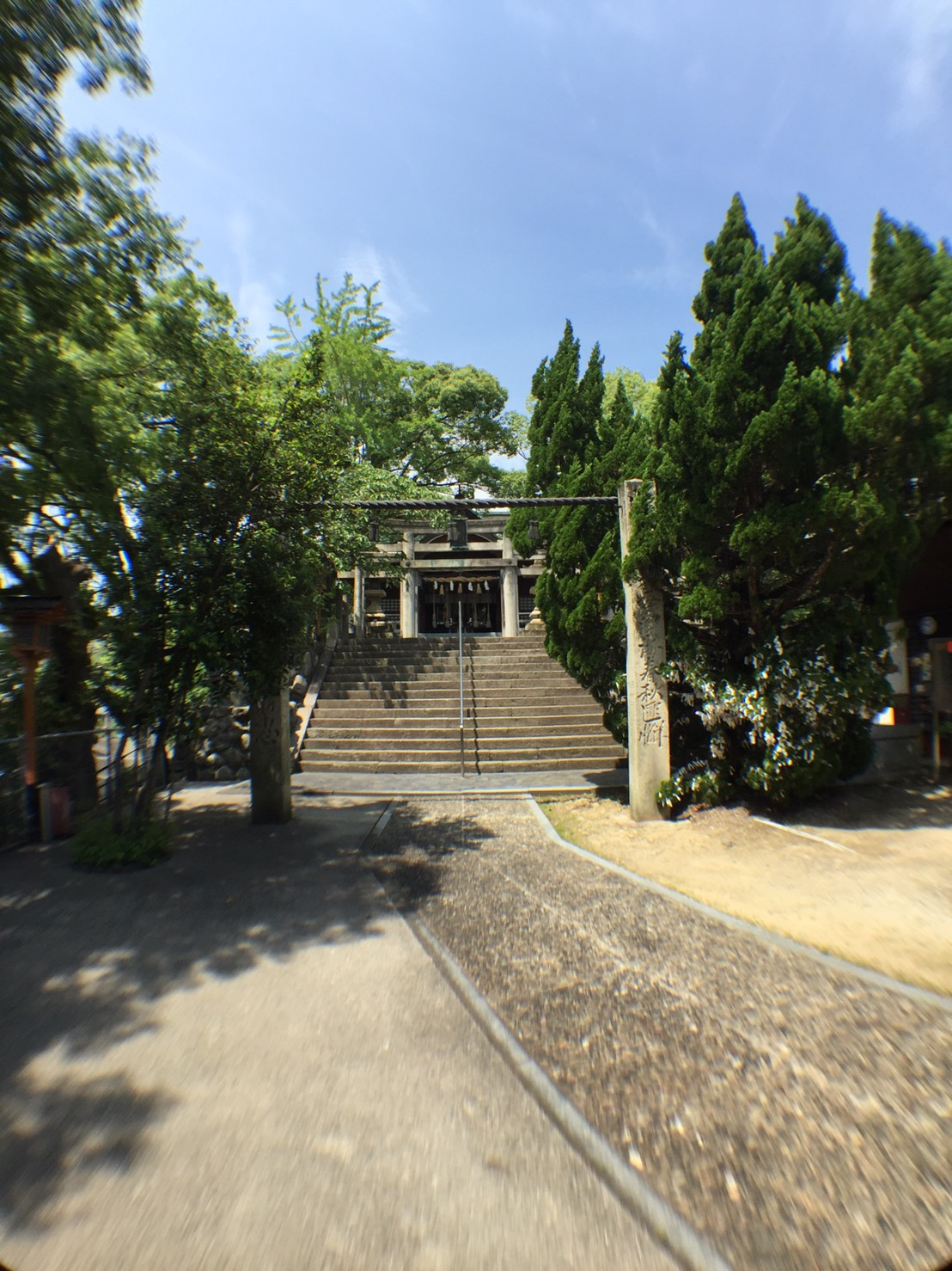 「八幡浜」の地名の由来であり、養老元年(717年)に創建されました。 県下で最古と言われている延宝鳥居や、二宮忠八の寄進碑、社殿の青石石垣には、「竹笹」や「徳利と盃」の浮き彫りがある